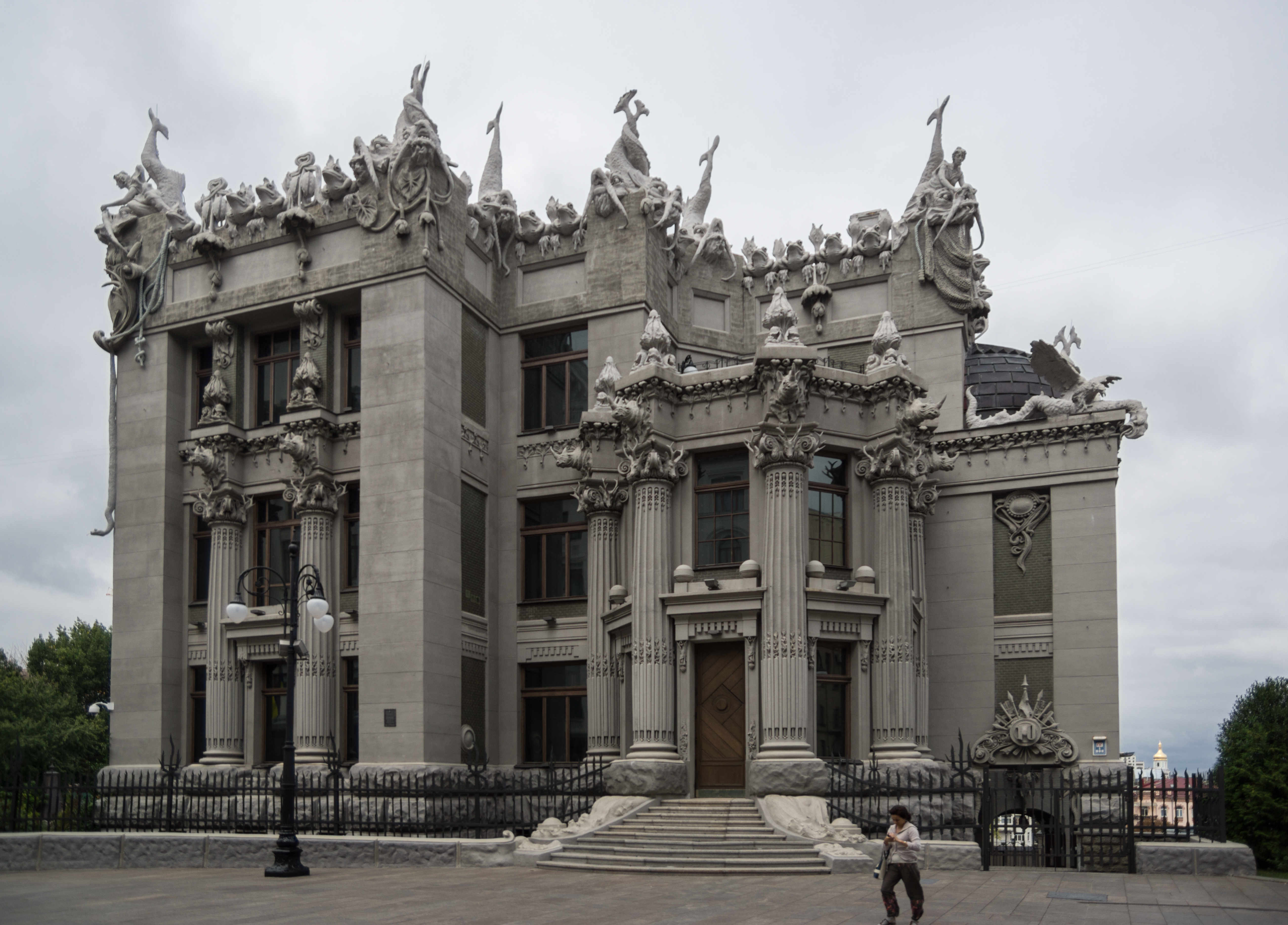 Casa con Quimeras